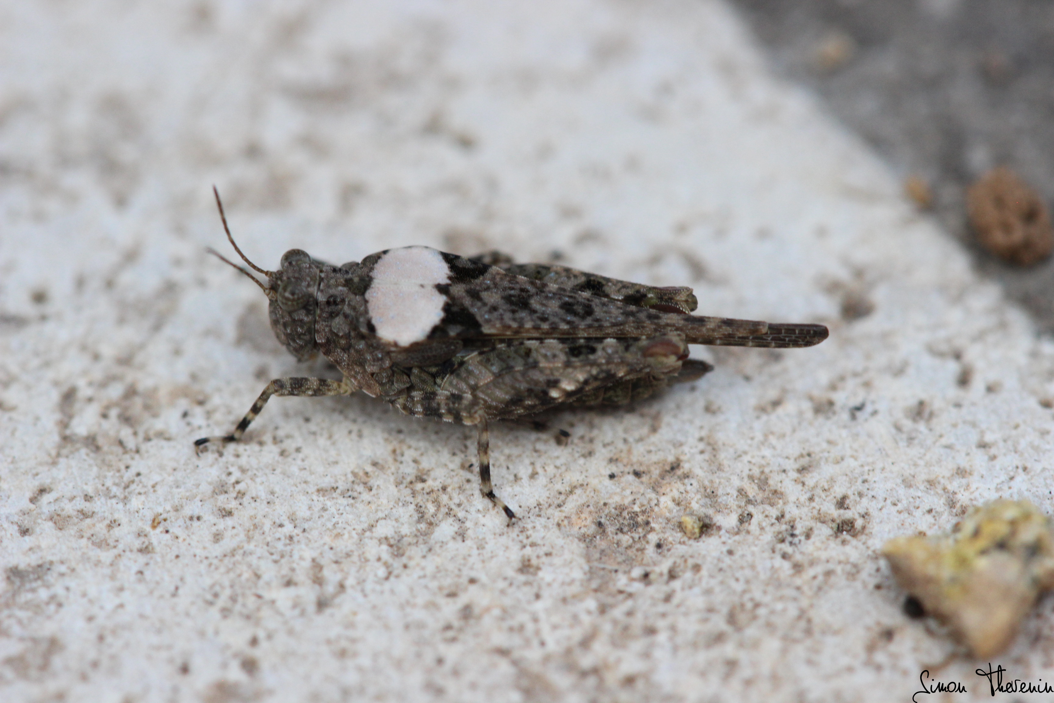 Photo de Paratettix meridionalis à deux taches blanches, prise à Rognes le 26 Juillet 2019 par Simon Theveni